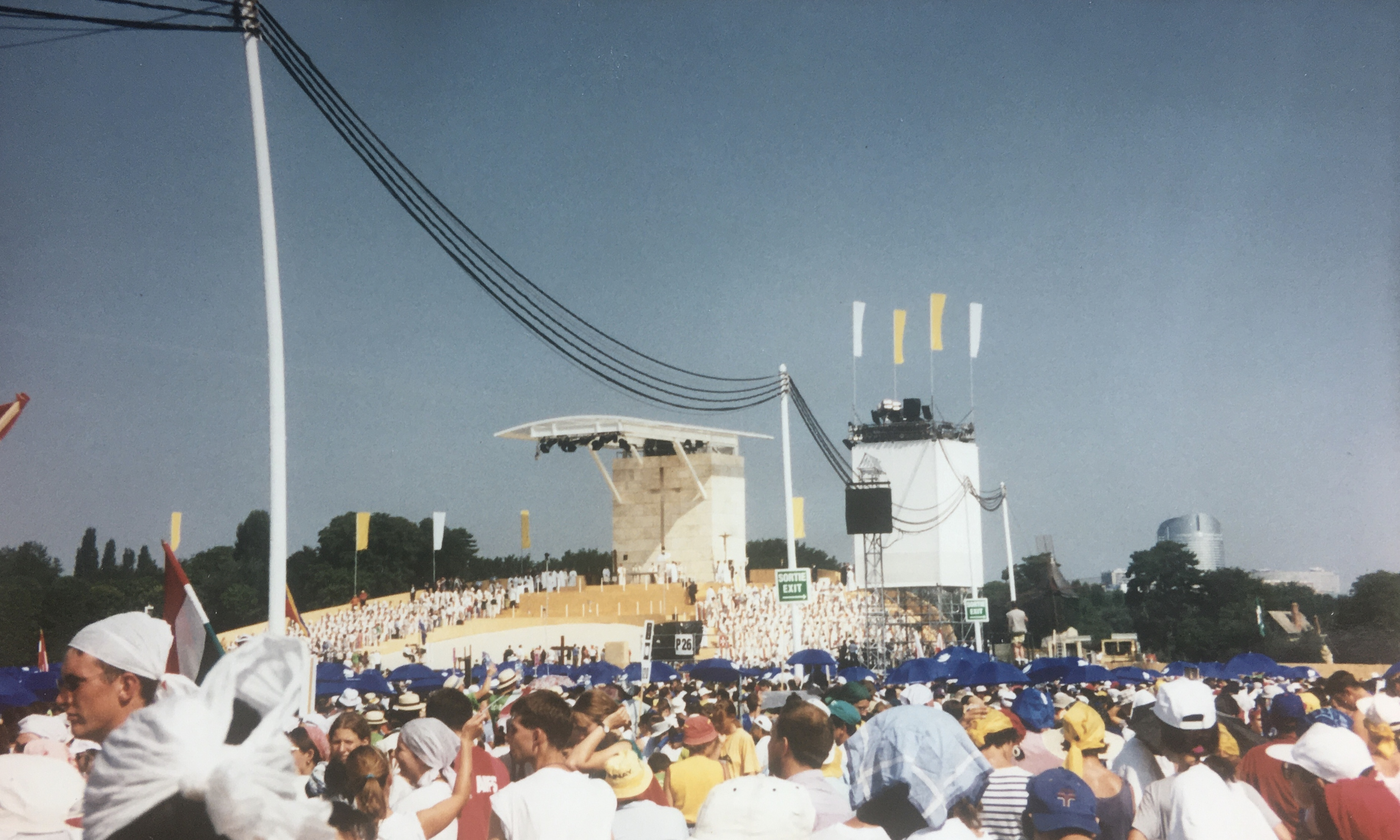 1997-08-24 Paris Longchamp JMJ.